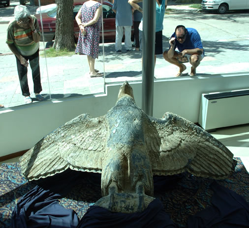 Espectadores observan el águila que servía de mascarón de proa al buque alemán Admiral Graf Spee, Montevideo, Uruguay, (febrero de 2006). Increiblemente y previendo que el objeto hiriese la sensibilidad de algunas personas , se cubrió parcialmente con una tela negra su base para evitar que se viera la cruz nazi. Nótese en el lado izquierdo del pecho del áquila , la marca del impacto de un casco de metralla.